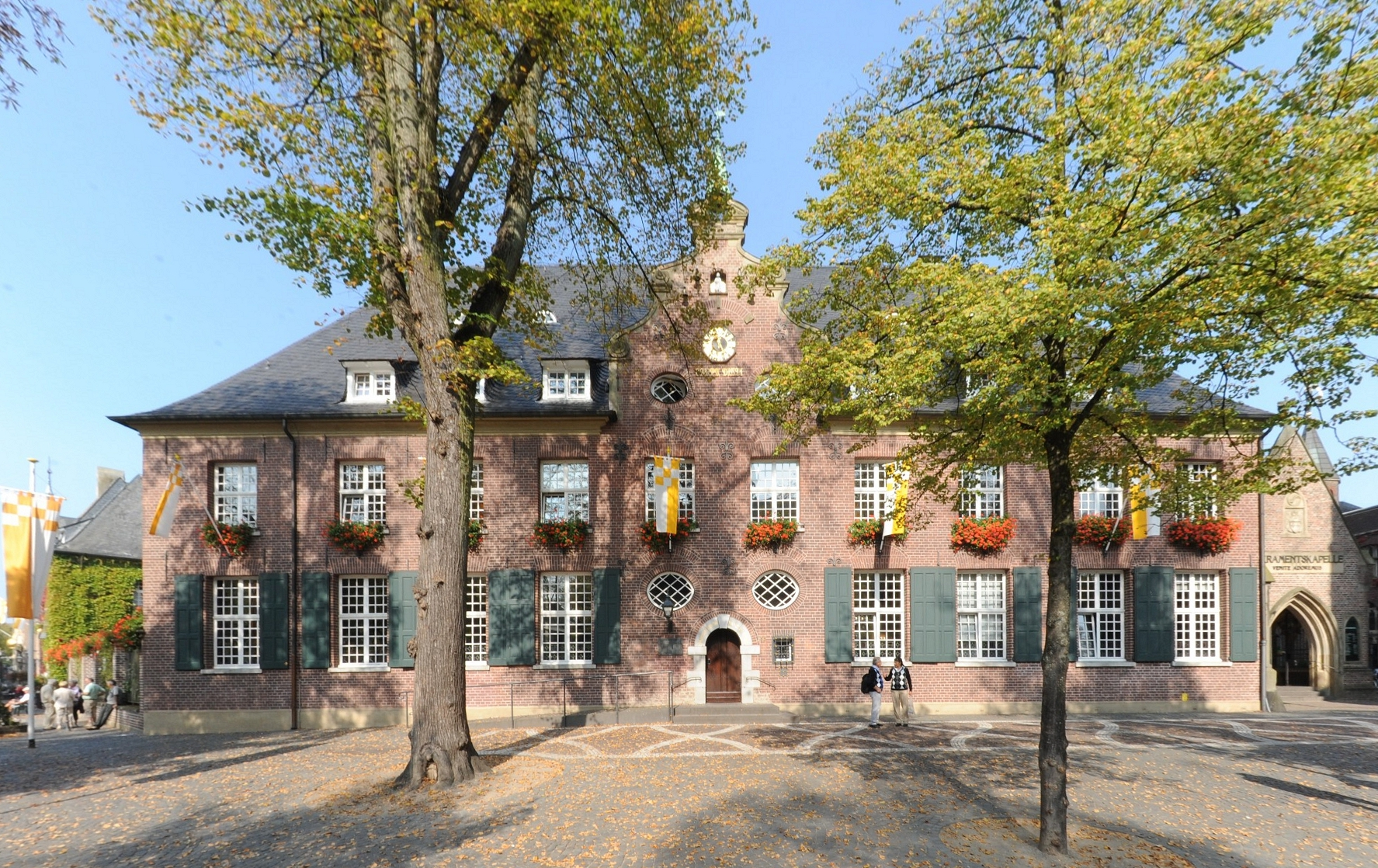 Kevelaer, Kapellenplatz 35, Priesterhaus